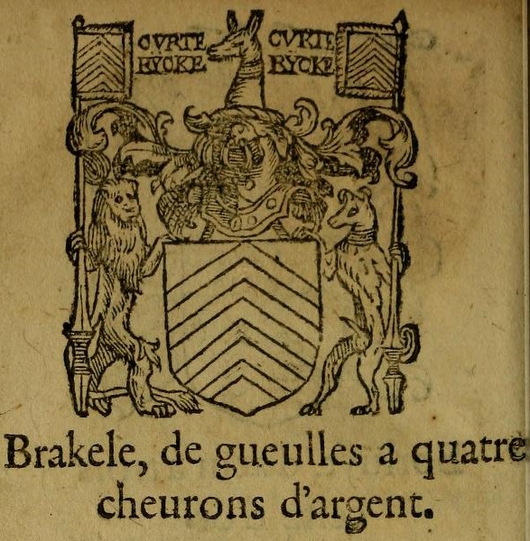 Wapenschild van Brakel in Den boomagert der wapenen (1567).